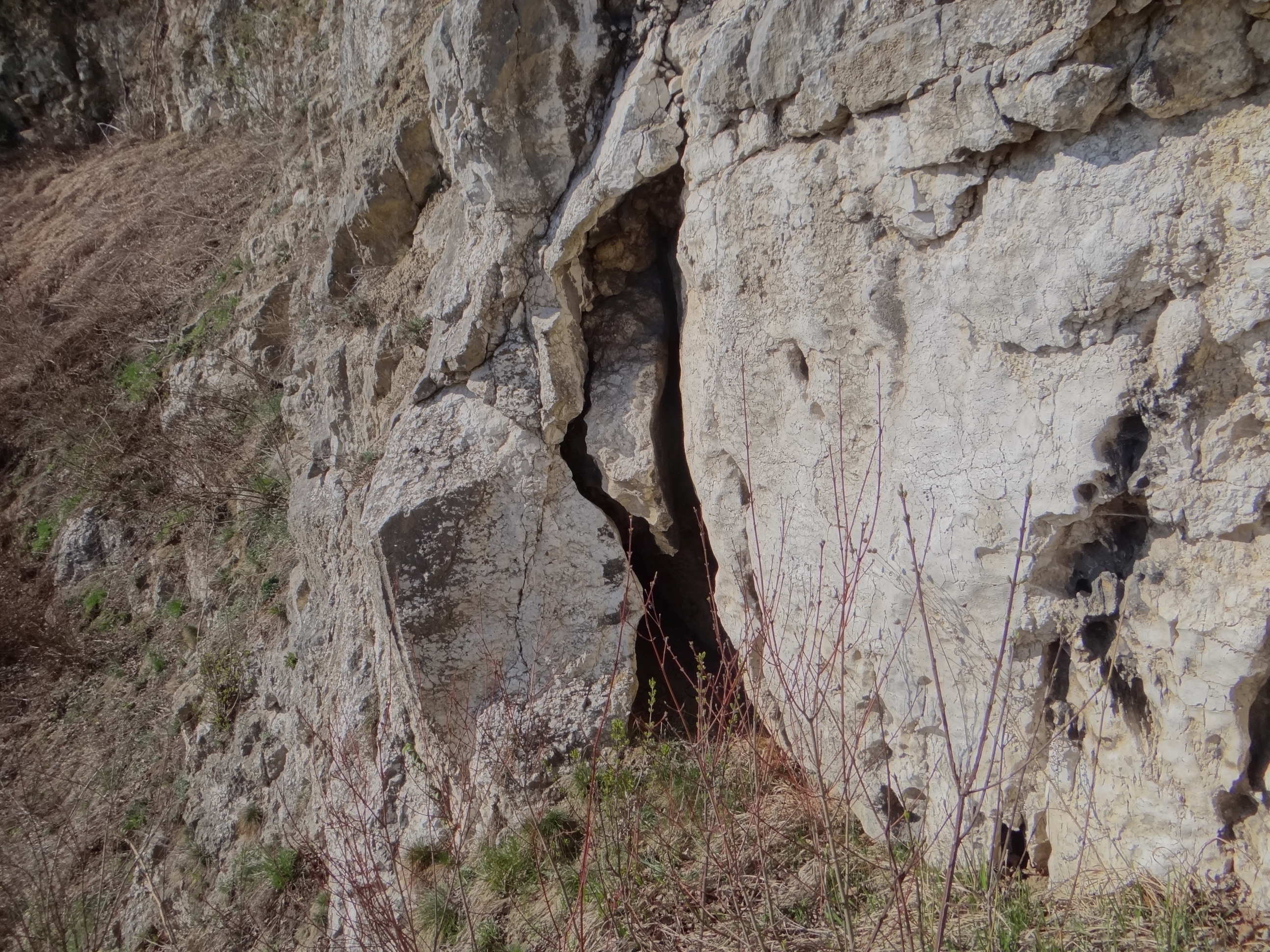 Otwór schroniska w Okrążku w Skałkach Piekarskich koło Krakowa